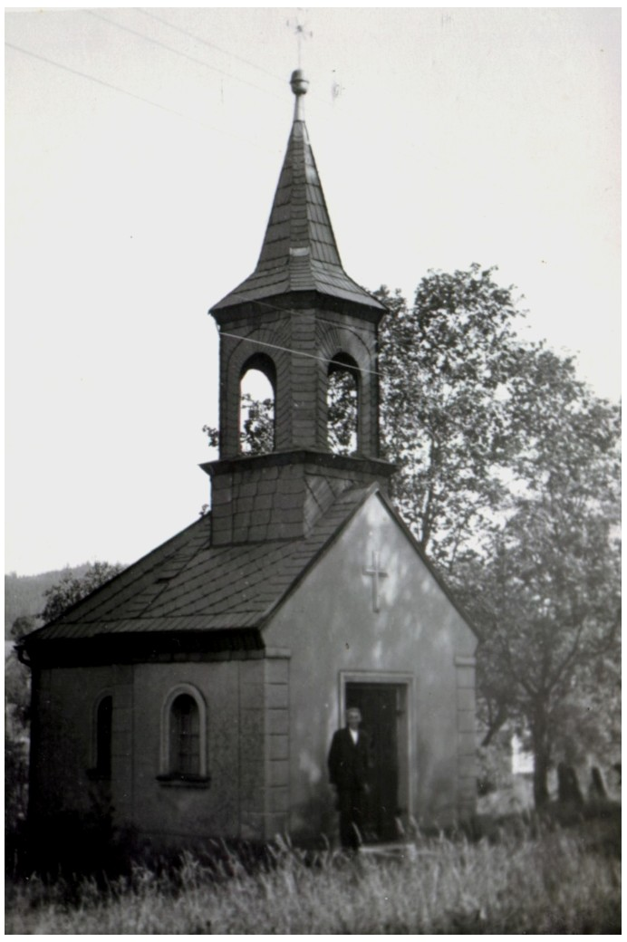 Kaple Panny Marie ve Velkém Šenově (dobová fotografie)